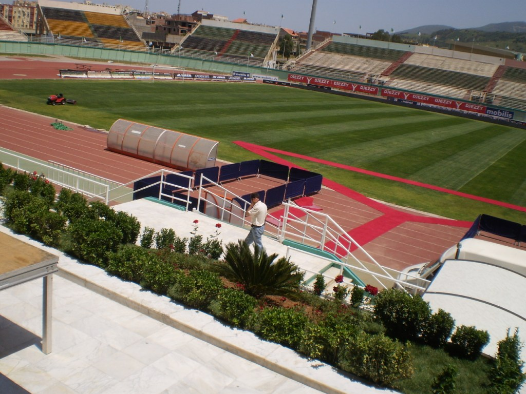 Branle-bas de combat à Blida, stade Tchaker, pour la finale de coupe d'Algérie. Veillée d'armes le mercredi. Tapis rouge déjà mis.